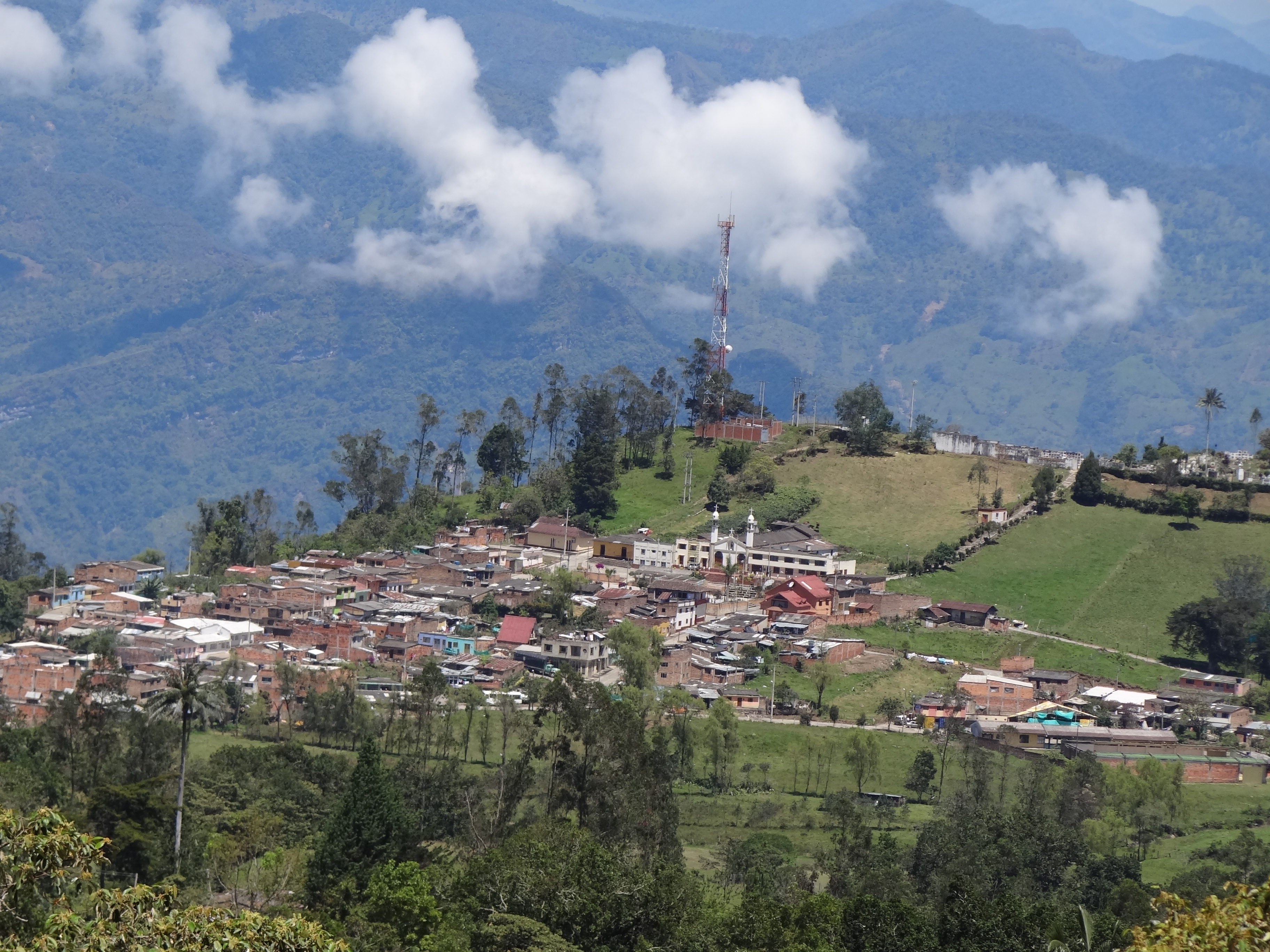 Panorámica del área urbana del del municipio de Buenavista, departamento de Boyacá, Colombia